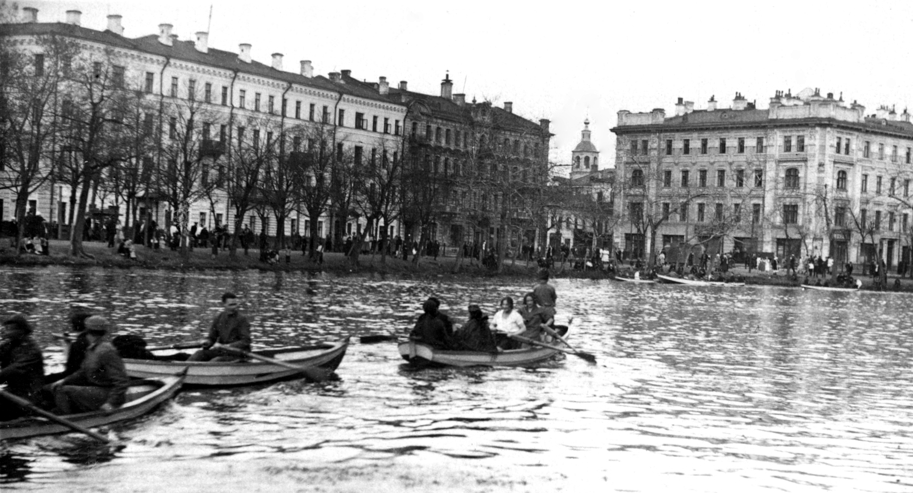 Чистые пруды в 1920е годы.